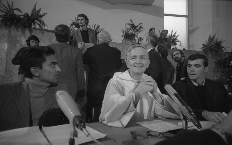 Der Friedenspreis des Börsenvereins des Deutschen Buchhandels wird an den Gründer und Prior der ökumenischen Bruderschaft von Taize, Roger Schütz, durch den Vorsteher des Börsenvereins Dr. Ernst Klett in Anwesenheit von Bundespräsident Walter Scheel in der Pauls-Kirche überreicht.